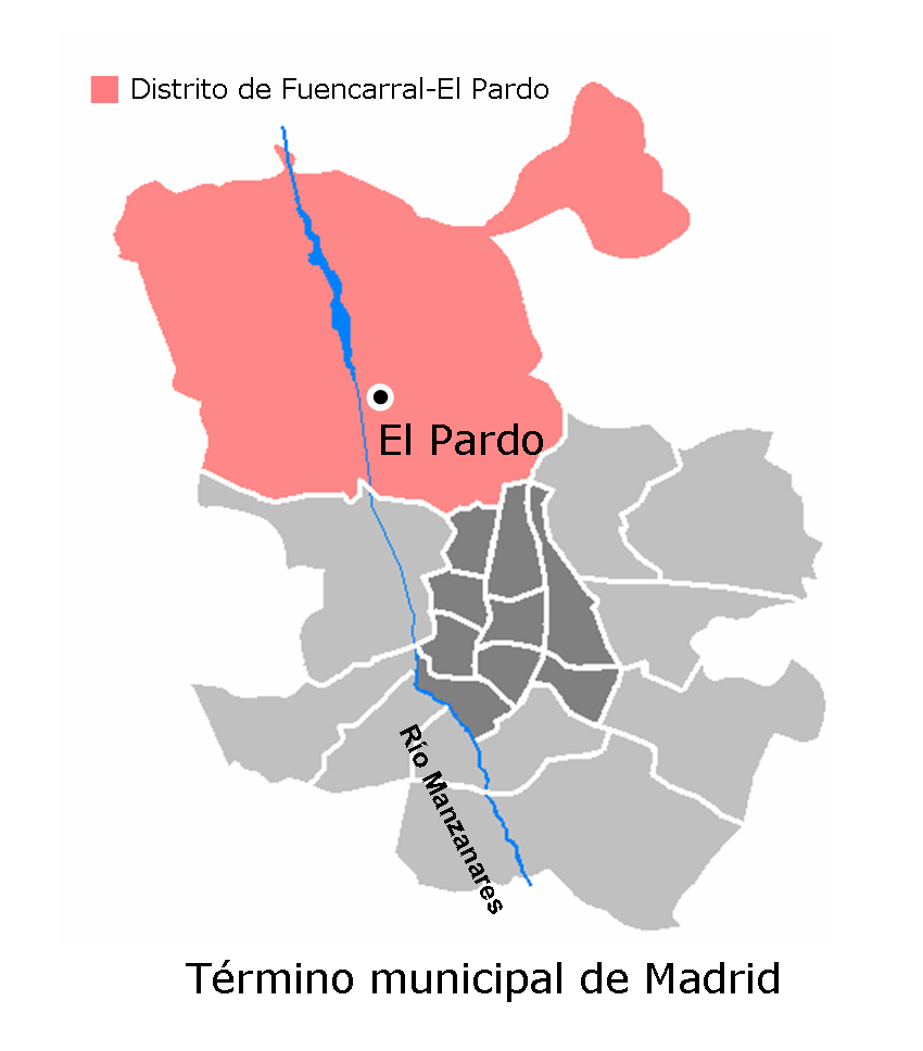 El Pardo map. Madrid, Spain